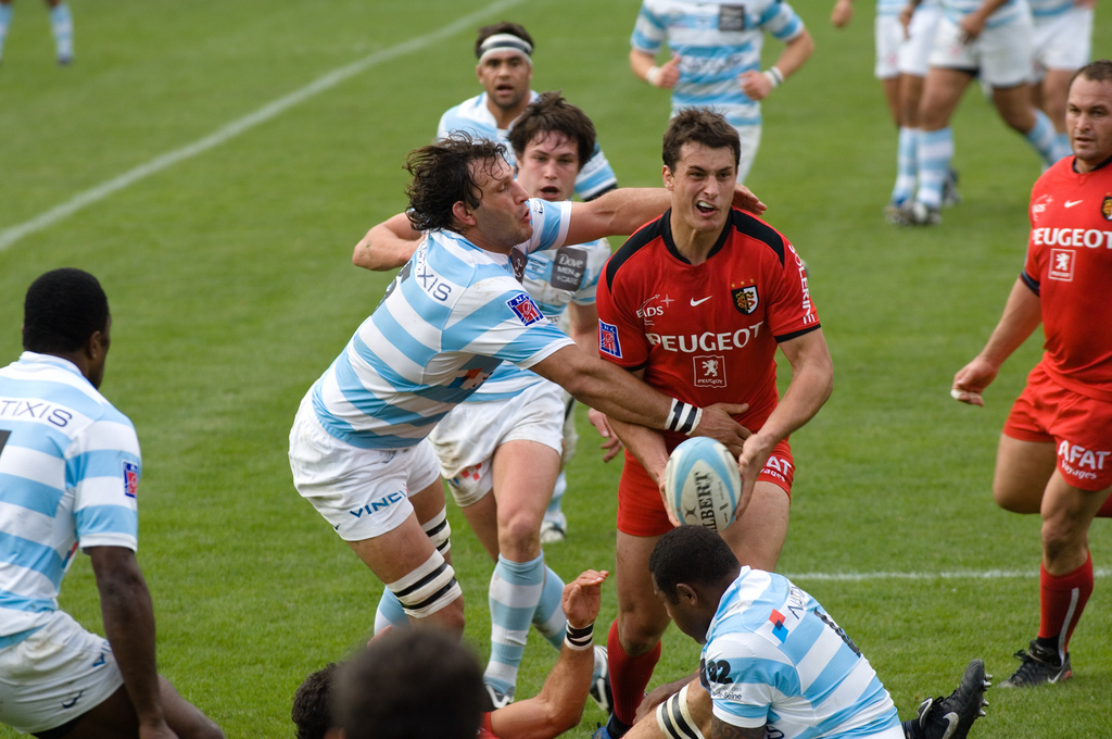 Yannick Jauzion, plaqué par Lionel Nallet, lors du match de top 14 Rugby Racing / Stade Toulousain du 31/11/09